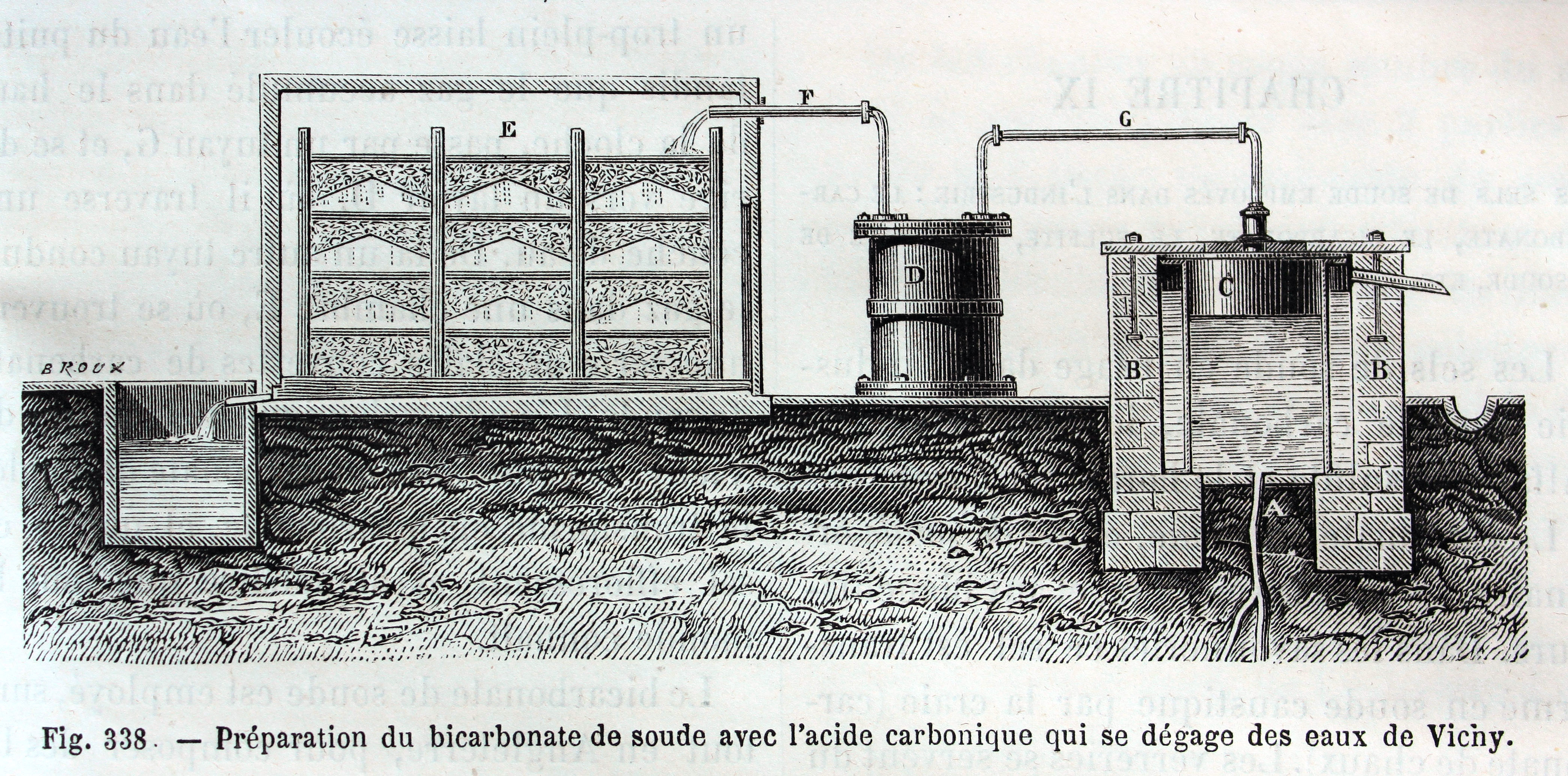 Ilustraciones de la obra : Les merveilles de l'industrie ou, Description des principales industries modernes / par Louis Figuier. - Paris : Furne, Jouvet, [1873-1877]. - Tome I